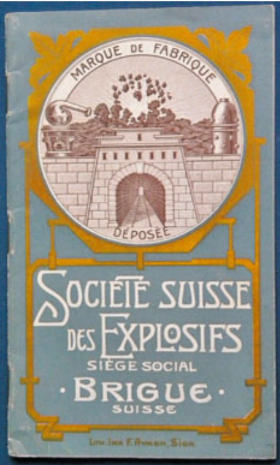 Logo der Société Suisse des Explosifs SSE, Brig-Glis VS, Schweiz